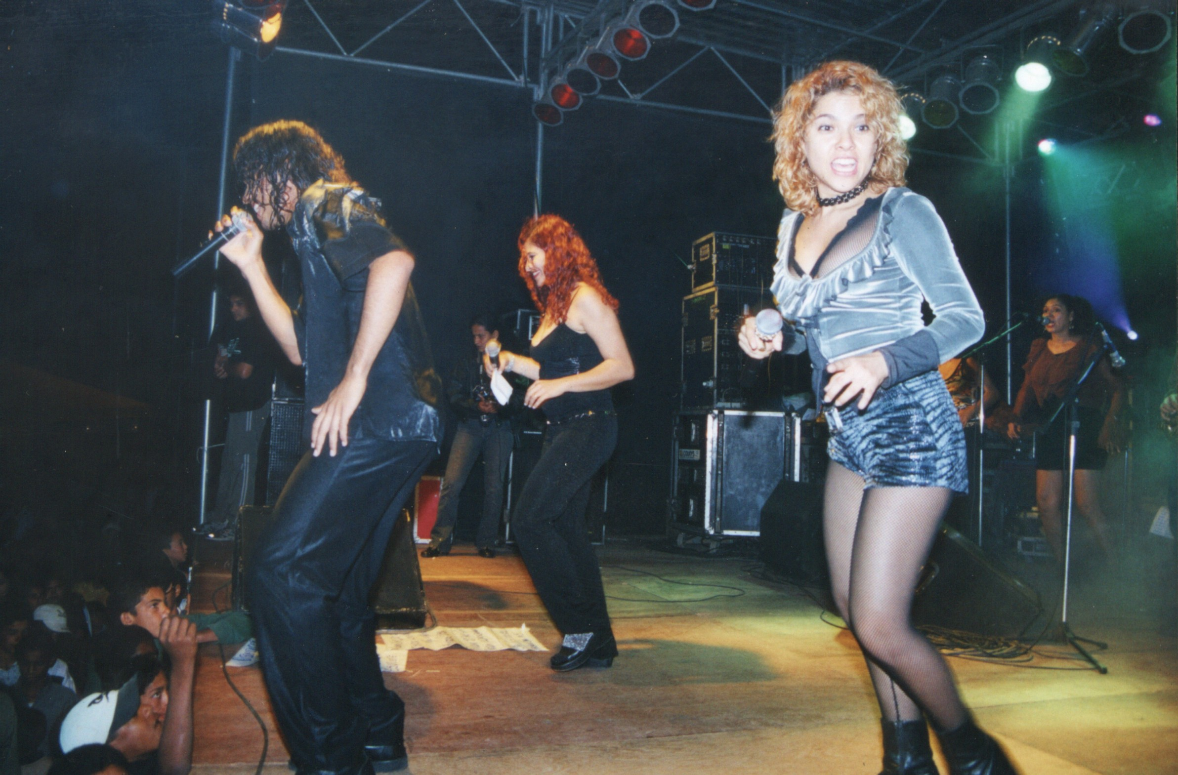 Banda Mastruz com Leite, em show na cidade baiana de Caetité